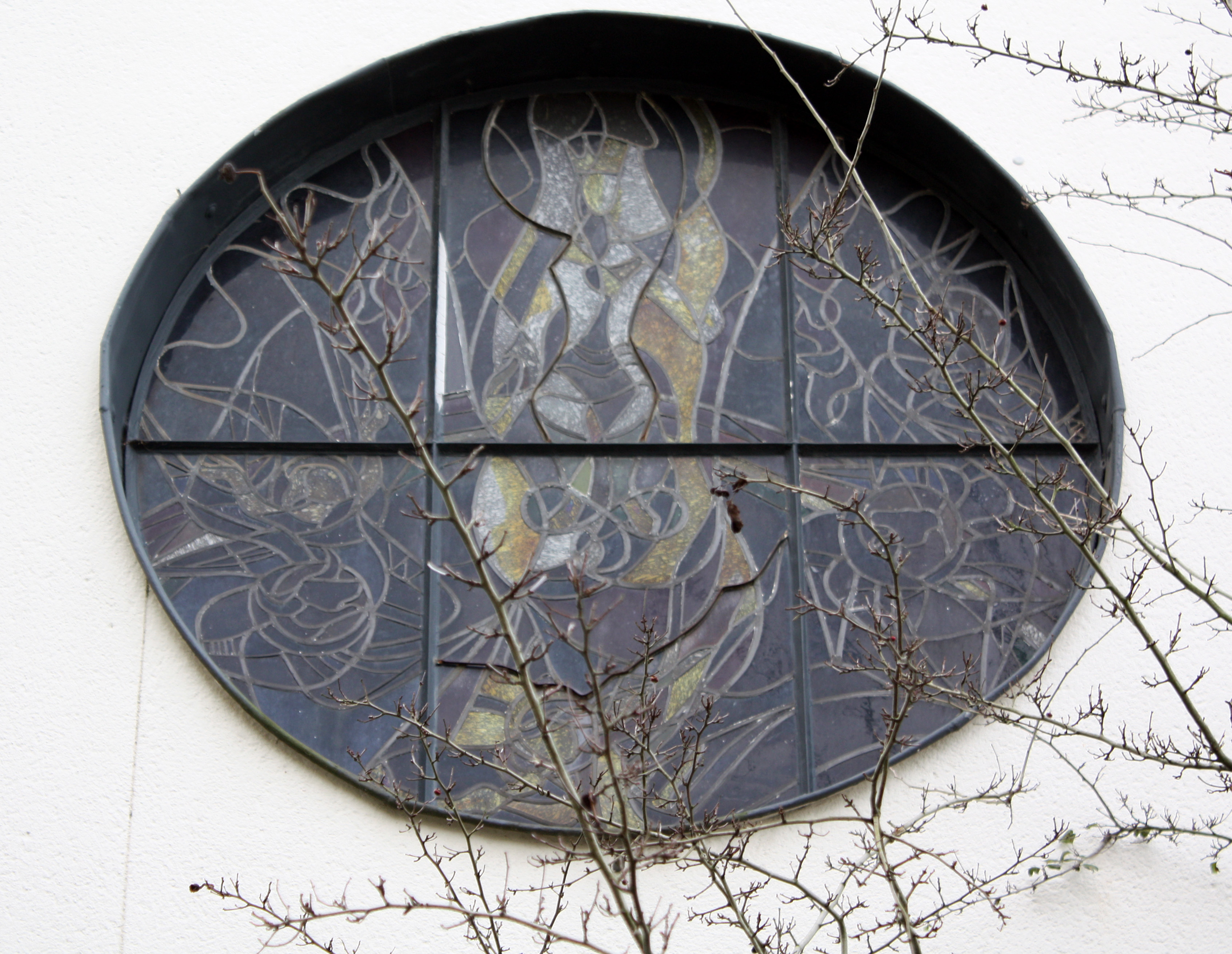 Efferen, Friedenskirche